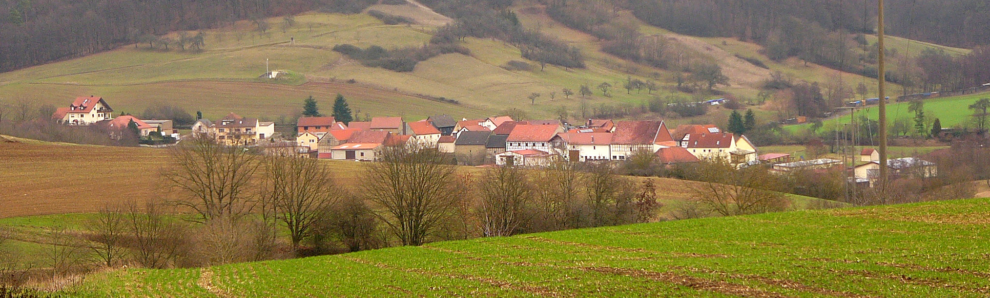 Sechsthal, Ortsteil von Zeil am Main.